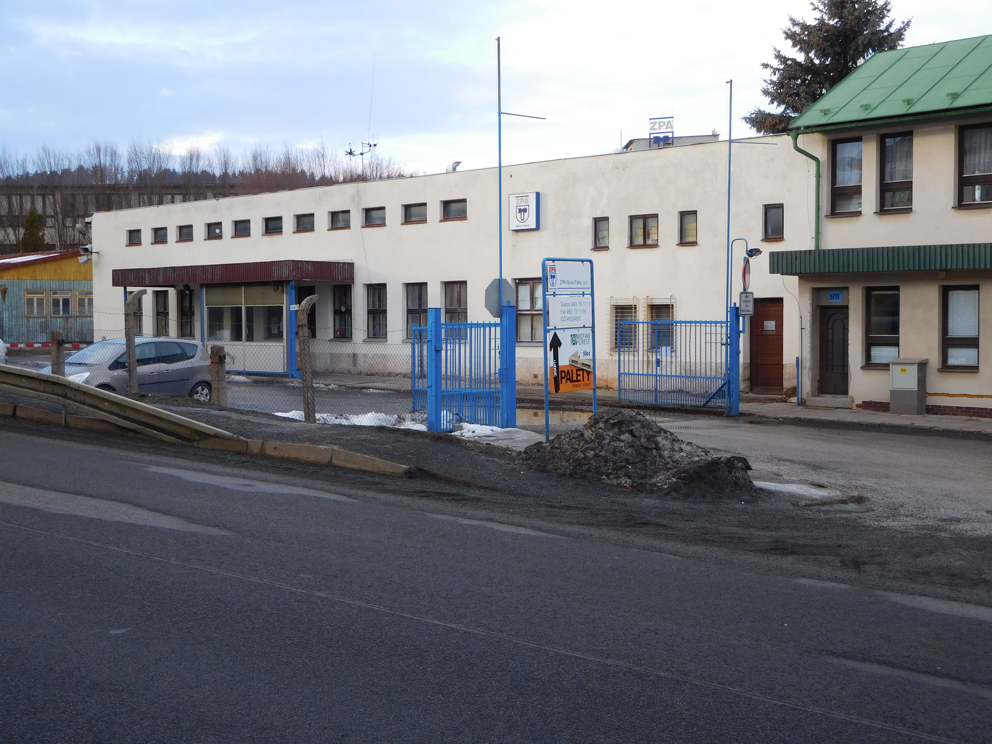 Nová Paka, Pražská 470, ZPA